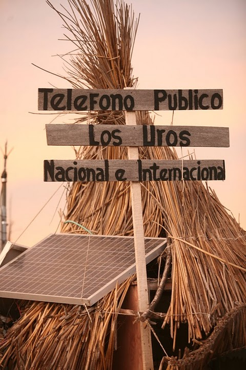 telefono publico en la isla de los Uros